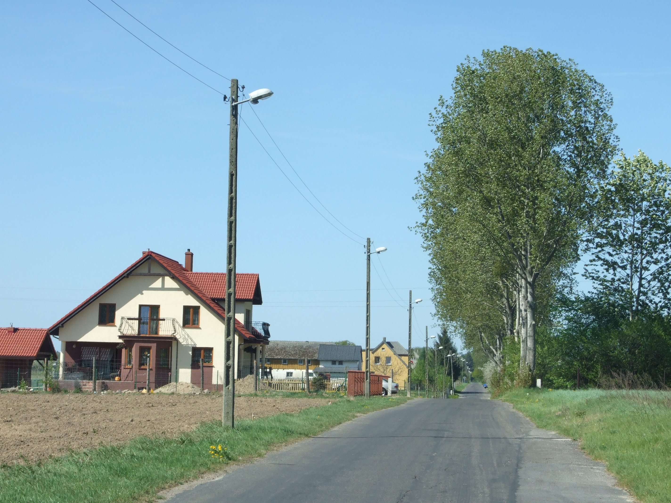 Wieńkowo